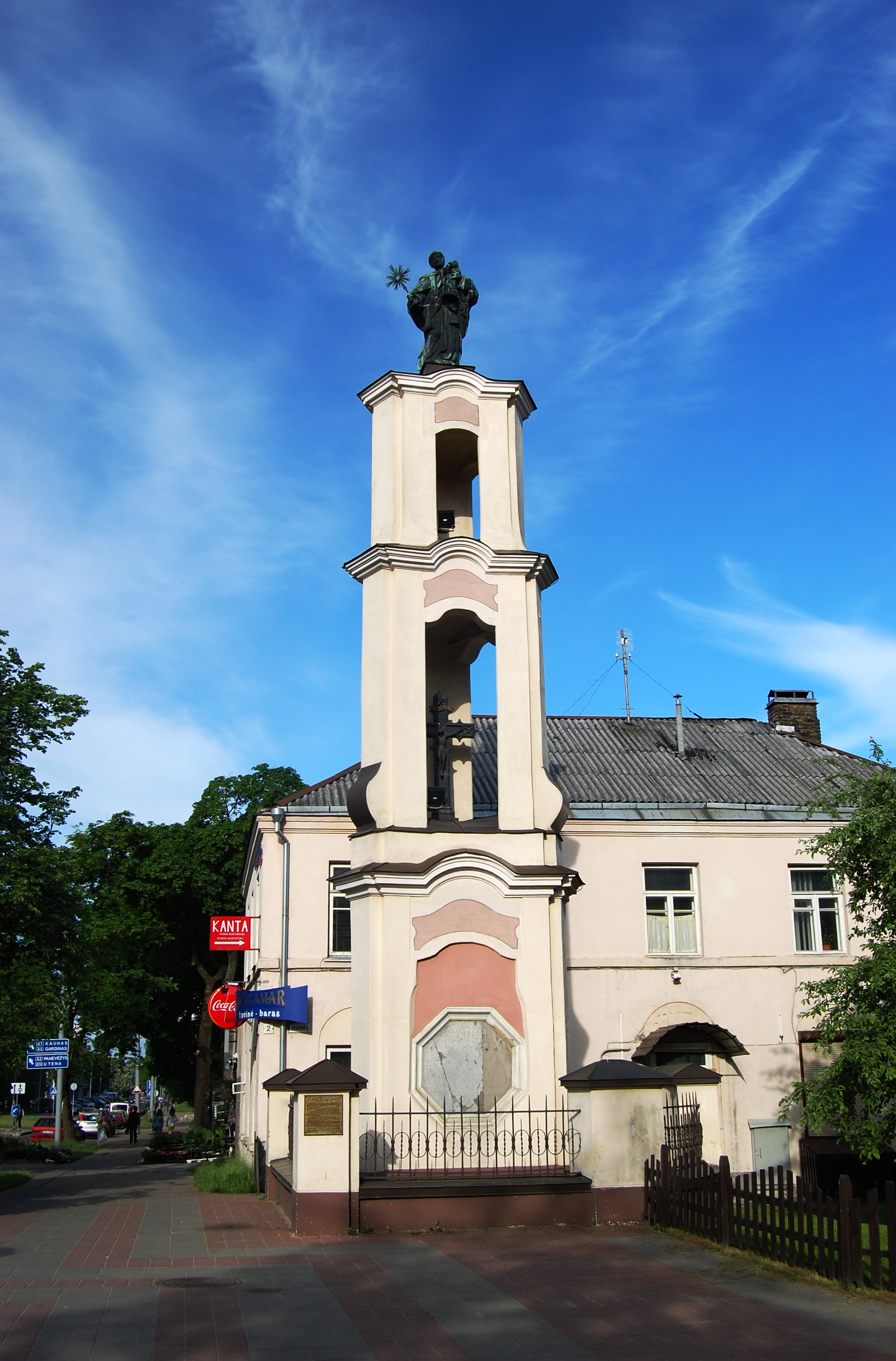 Šv. Hiacinto (Jackaus) koplyčia, Vilnius, Lithuanuania